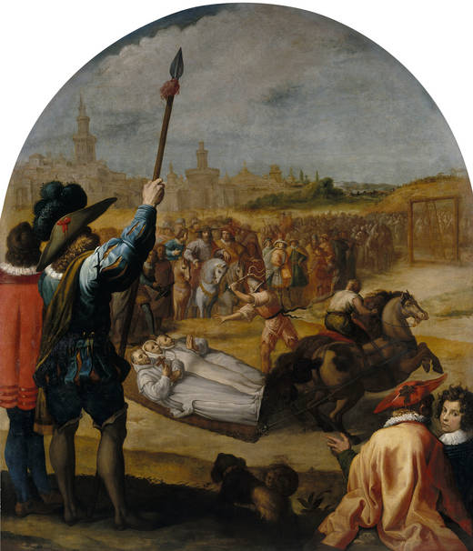 El martirio de tres cartujos en la cartuja de Londres.label QS:Les,"El martirio de tres cartujos en la cartuja de Londres."